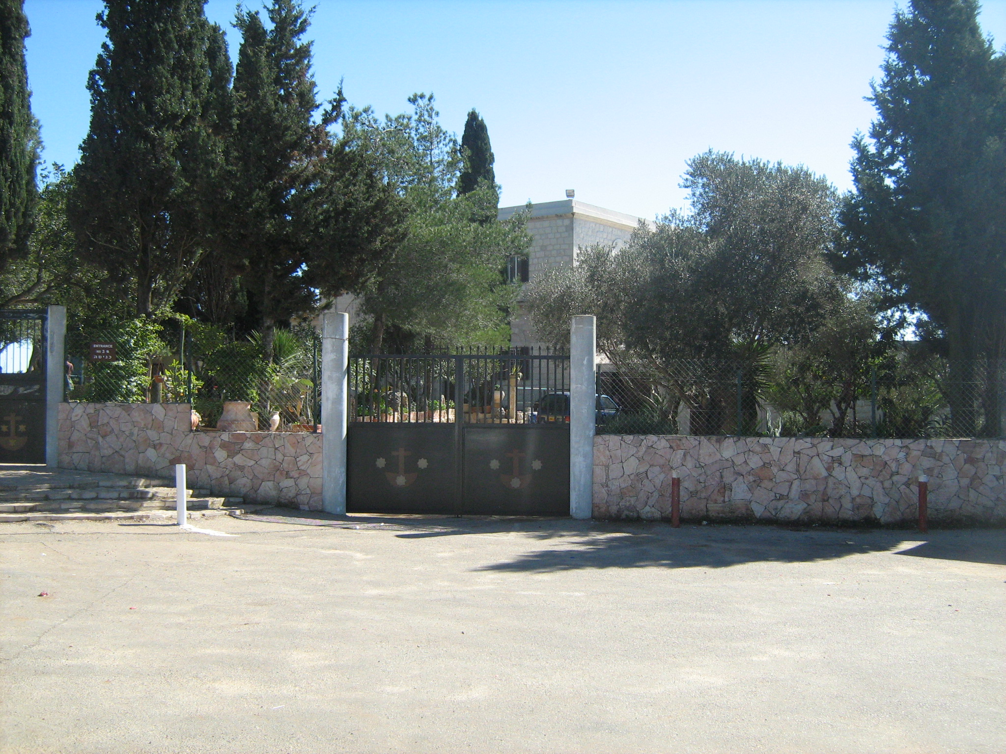 המנזר בקרן הכרמל